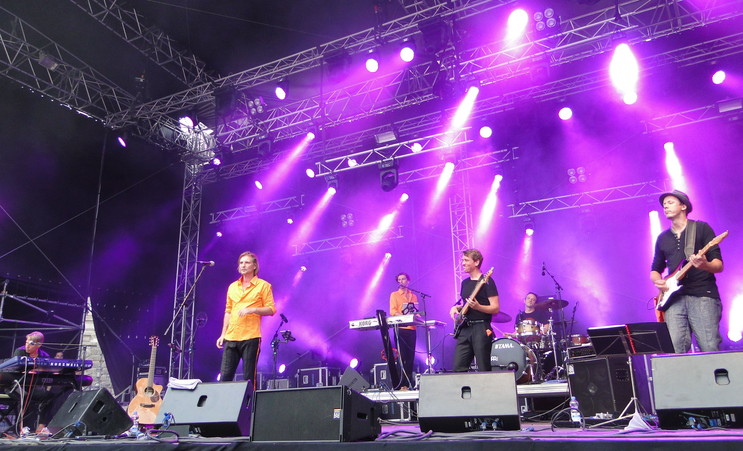 Die deutsche Gruppe Die Zöllner (Eigenschreibweise DIE ZÖLLNER) im Jahr 2013